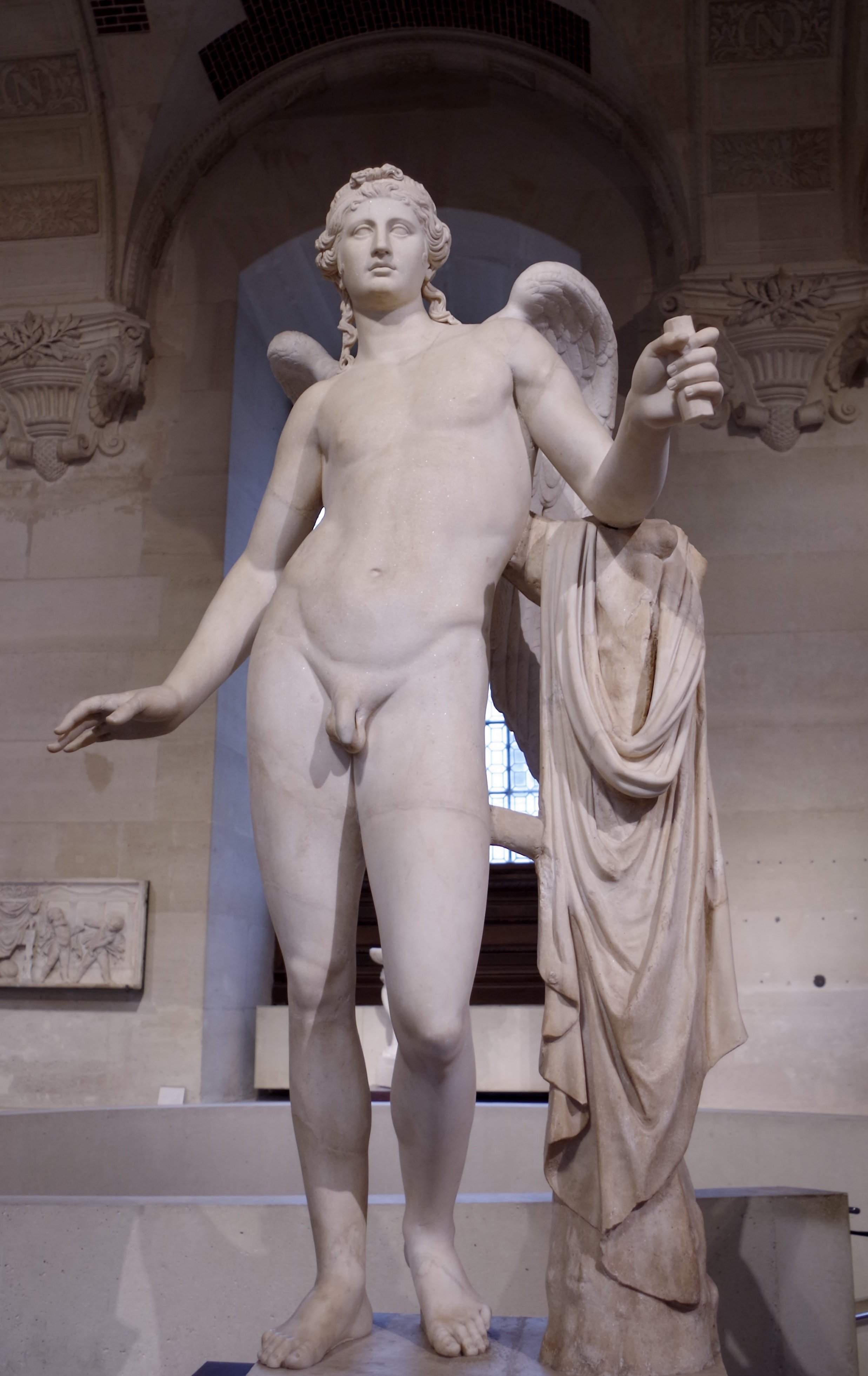 Eros - Le Génie Borghèse - MR 140 Ma545